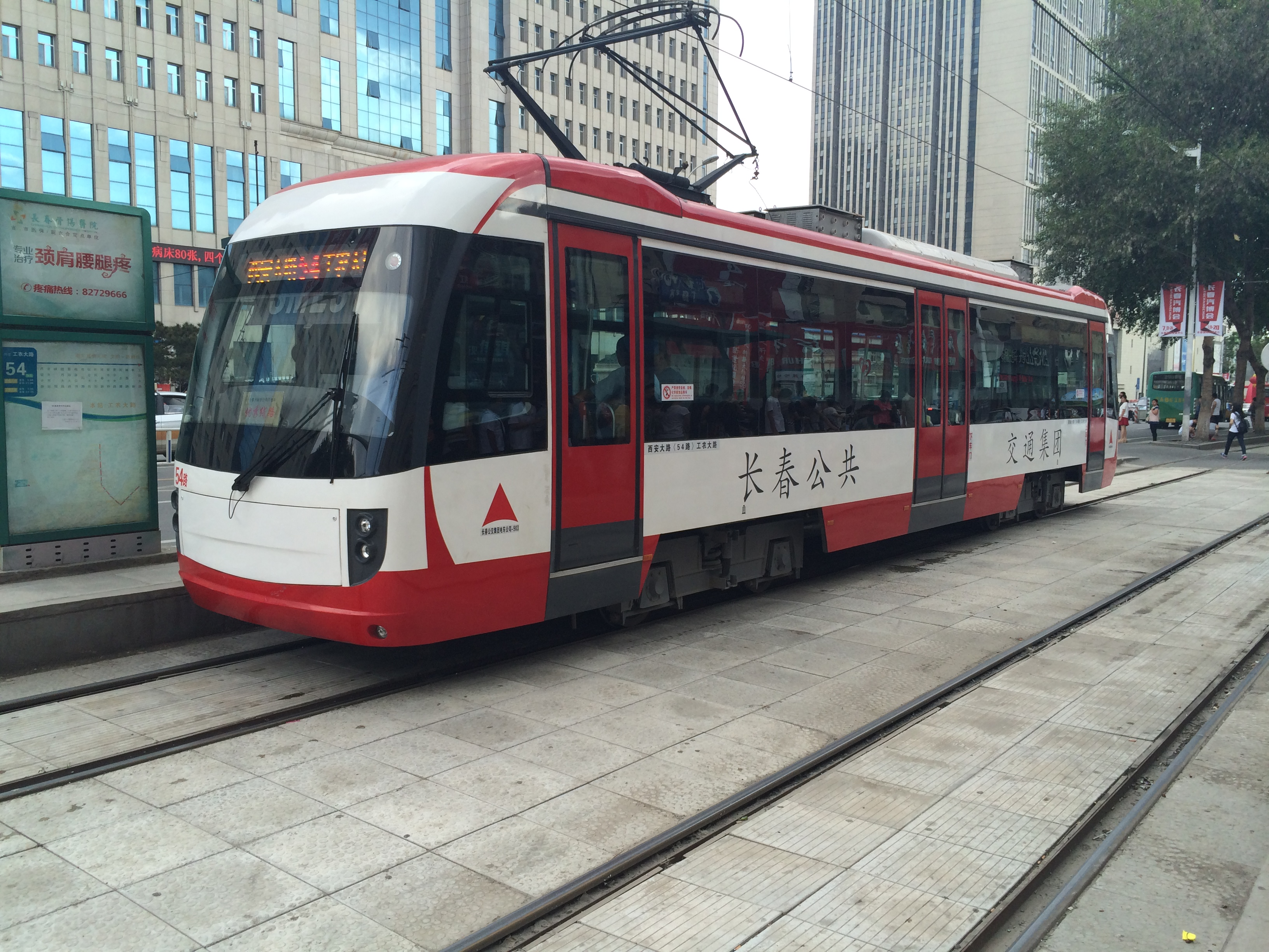 长春有轨电车 900系903号在工农大路总站